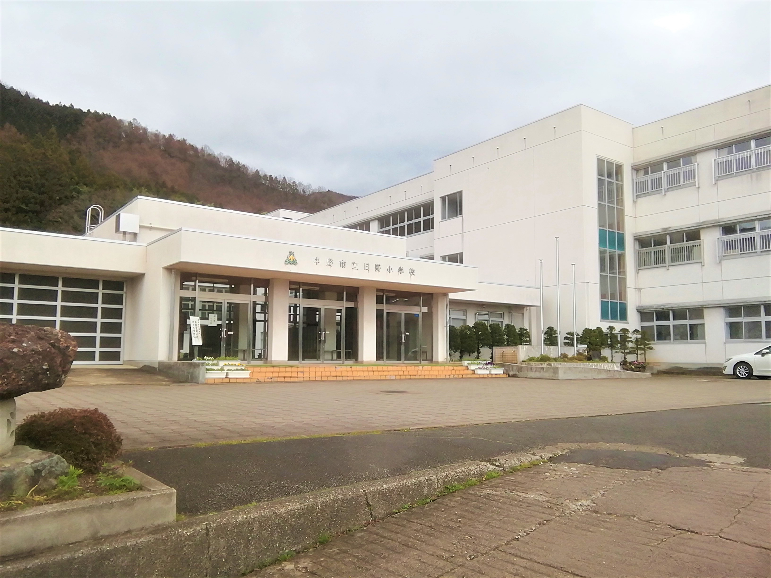 中野市立日野小学校（2020-4-1）